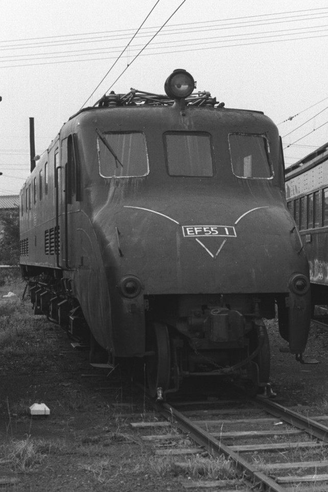 高崎第二機関区留置時の様子。許可を得て撮影。ナンバープレートは取り外され、機関区で保管されていた。 JNR-EF55-1 Electric locomotive, front view（国鉄EF55 1 前面=1エンド側）